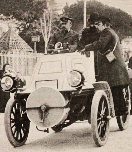 Une Mercedes phoenix 24 hp appartenant à Emil Jellineck, à la semaine de Nice 1900 - Le Sport universel illustré du 17 février 1900, p.111